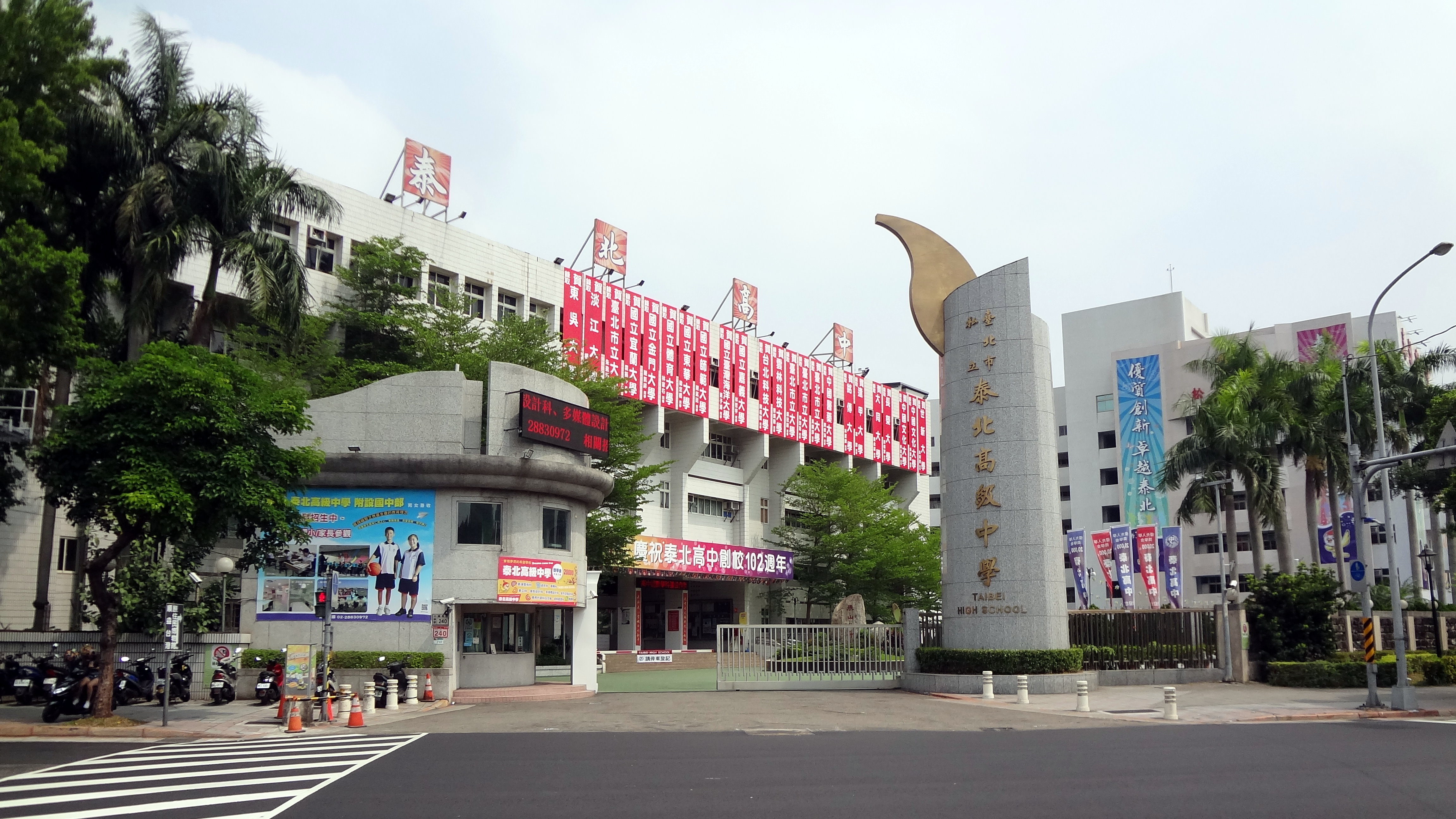 臺北市私立泰北高級中學大門。